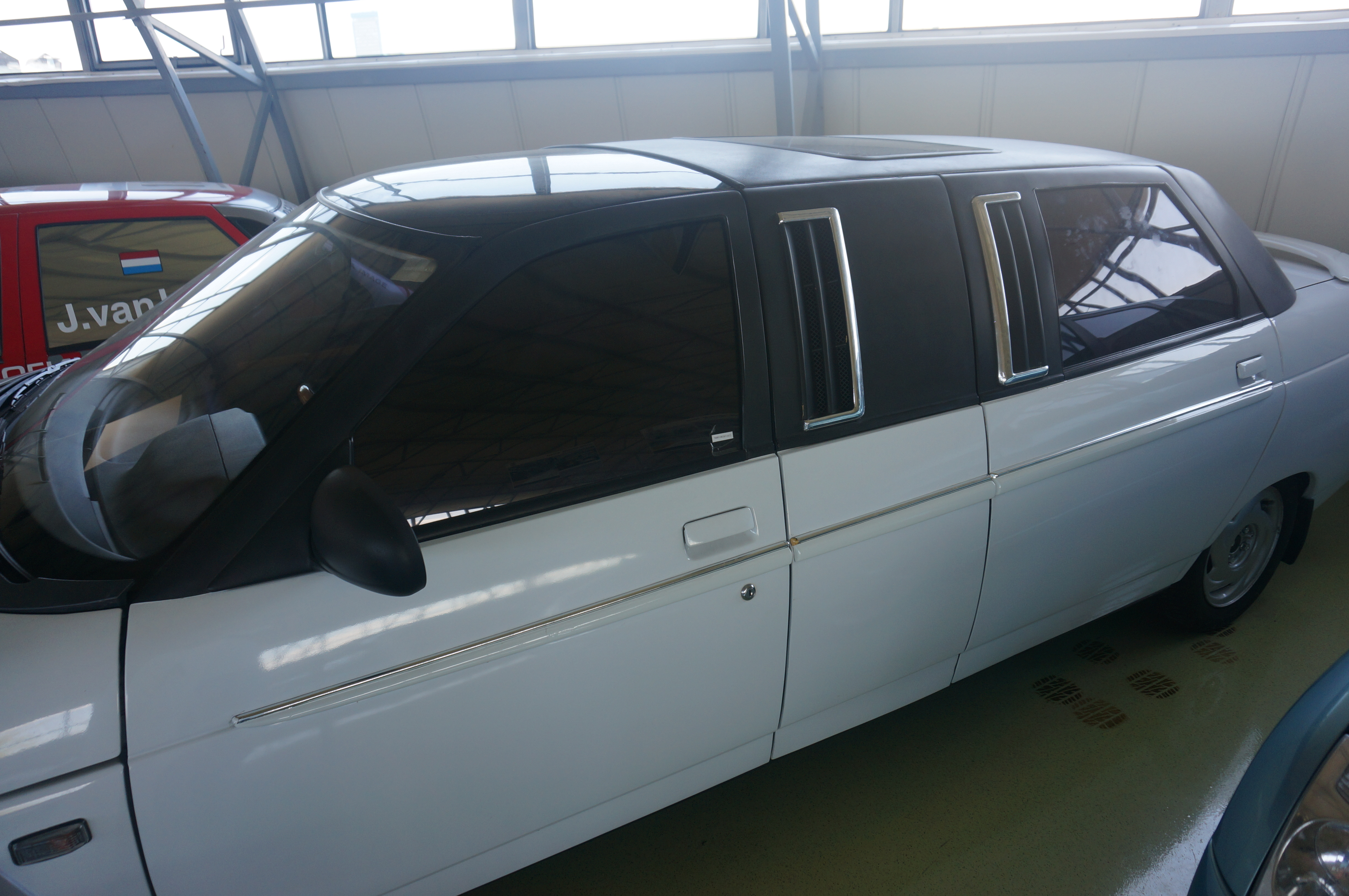 Lada 21109 "Консул" в Техническом музее Тольятти